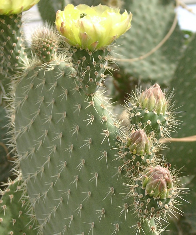 Opuntia leucotricha, Blüte und Knospen